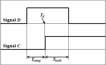 На рисунке изображены два входных сигнала D-триггера: сигнал синхронизации С (тактирующий) и сигнал данных D. Чтобы выход D-триггера успел переключиться, сигнал D должен быть стабилен некоторое время ДО переключения сигнала С в точке Tc - это и будет временем предустановки триггера (Tsetup). Аналогично, сигнал D должен быть стабилен некоторое время ПОСЛЕ переключения сигнала С, это время называется временем удержания триггера (Thold).